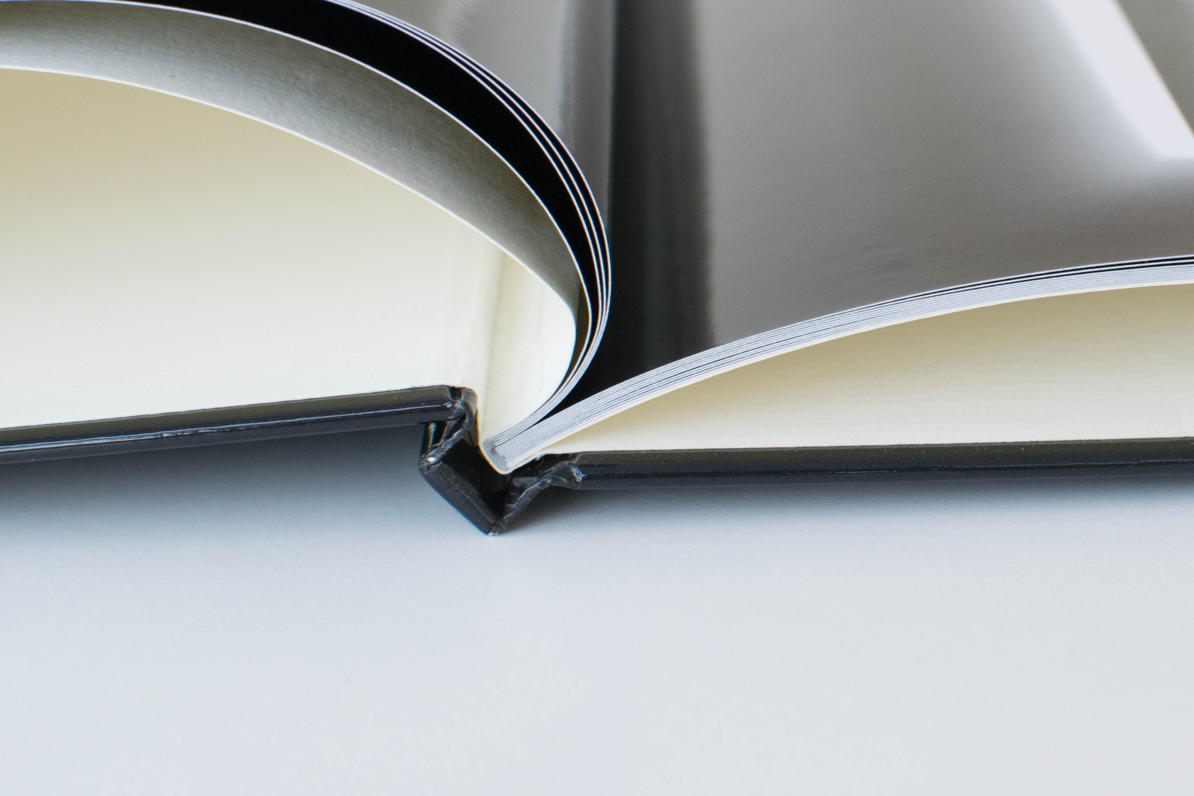 Fotobuch im Digitaldruckverfahren mit Hardcover und Klebebindung